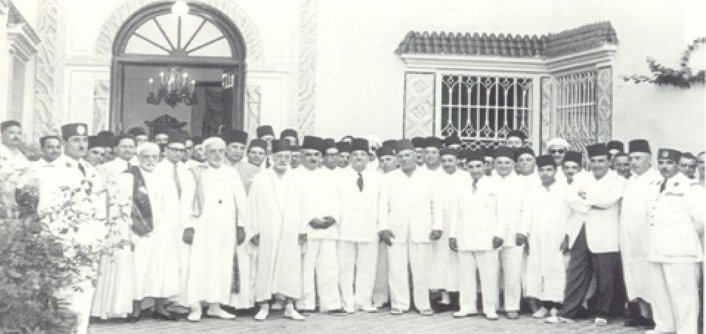 Légende originale de l'image : Les "Quarante" devant l'une des portes du Palais. On reconnaît au 1er rang, de gauche à droite, le Colonel Klibi ; les Cheikhs Mohamed el-Aziz Djaït, Cheikh al-Islam malékite, et Mohamed Abbès, Cheikh al-Islam hanéfite ; Lamine Bey ; Abdelaziz Bey ; Salah Farhat ; Chédly Bey ; Béchir Ben Yahmed ; Taïeb Miladi ; Amar Dakhlaoui ; Mhamed Bey ; Chédly Khalladi ; Gafsy ; et au 2e rang, de gauche à droite, el-Nachi ; Hamda Ouslety ; Dr Hamed Stamrad ; Farhat Hached ; Sadoq Moqadem ; Aziz Djellouli ; Fathi Zouhir ; ...